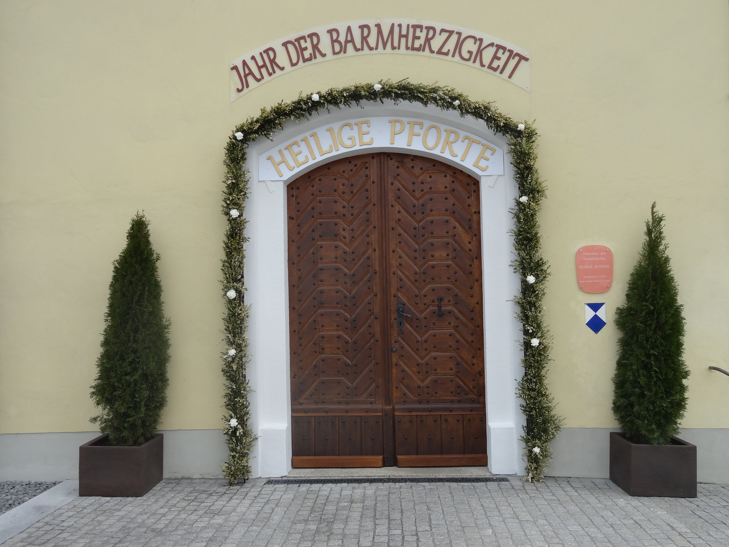 Heilige Pforte im Jahr der Barmherzigkeit (Westportal) an der Wallfahrtskirche Maria Schnee in Aufhausen (Lkr. Regensburg)